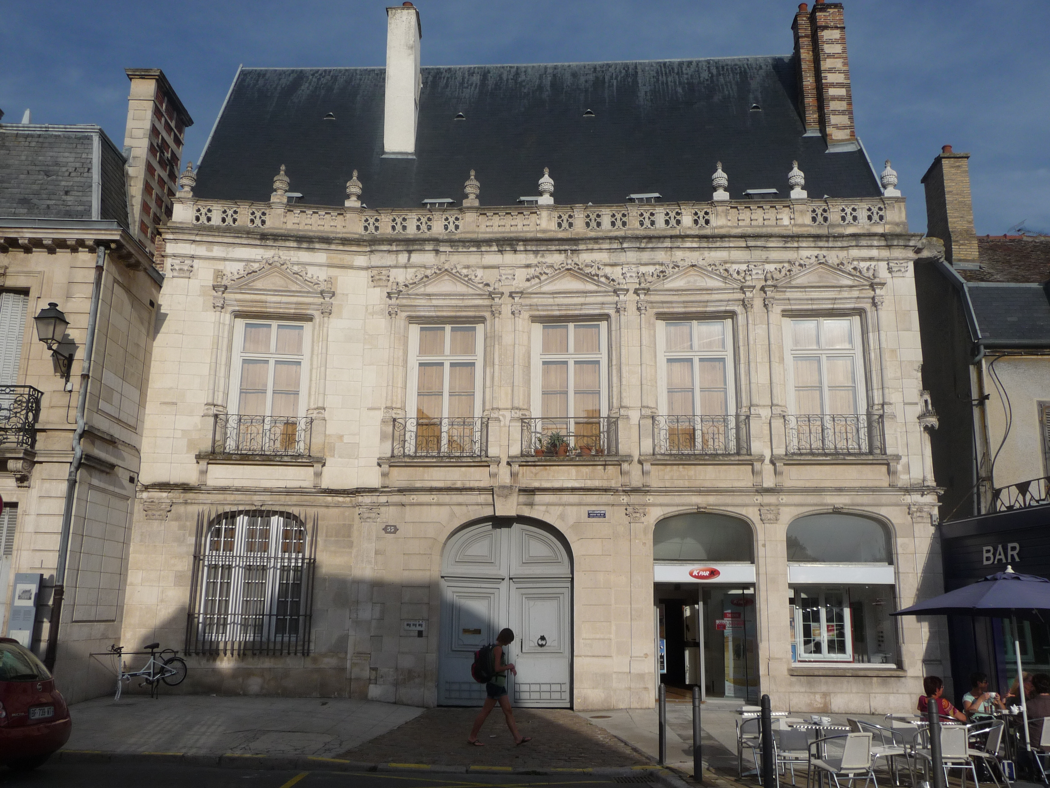 Façade sud-est. Style Renaissance ( 1535 ) .